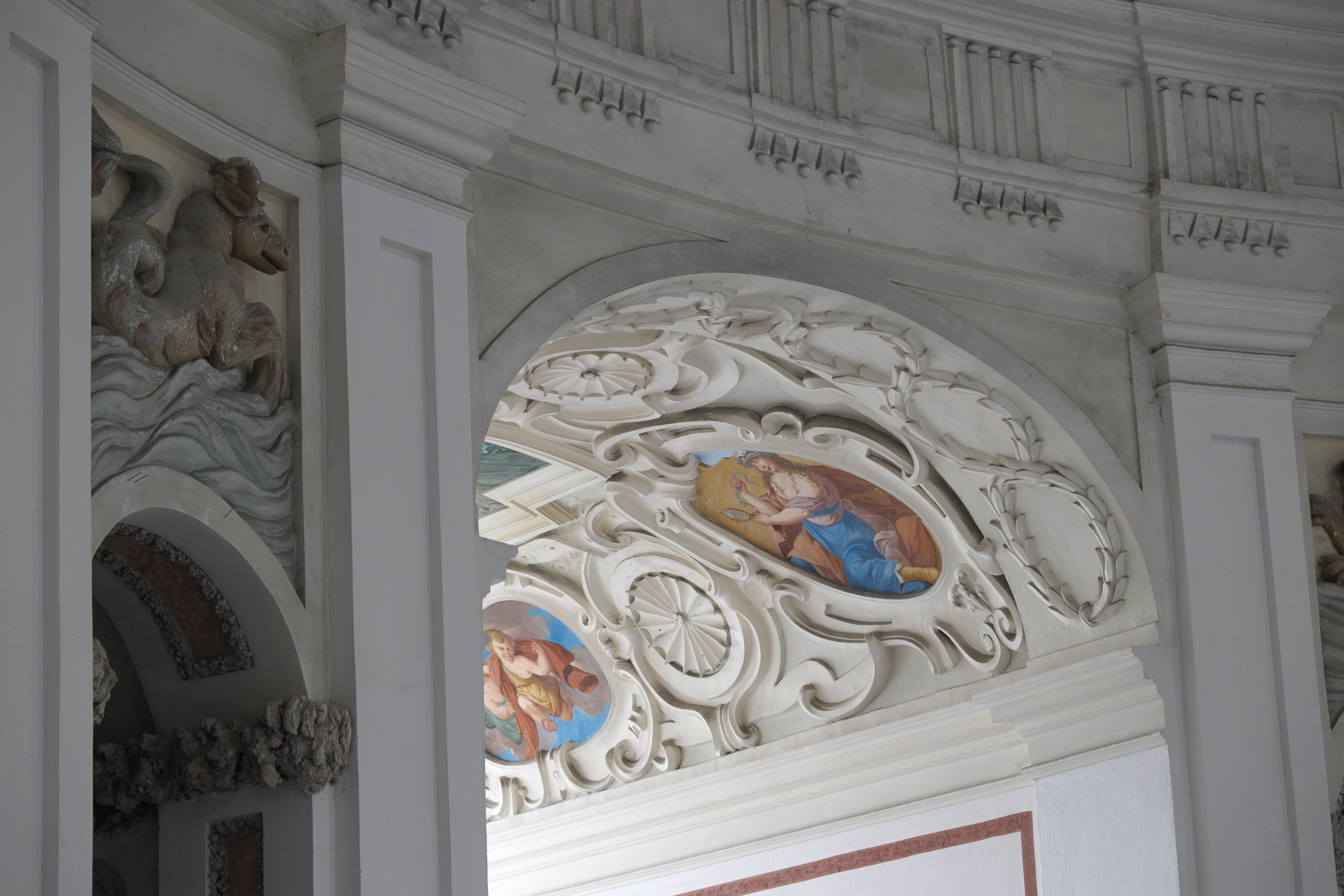 Blumengarten Kroměříž in Kroměříž in der Region Zlin in Tschechien, Stuck und Deckenmalerei in der Rotunde